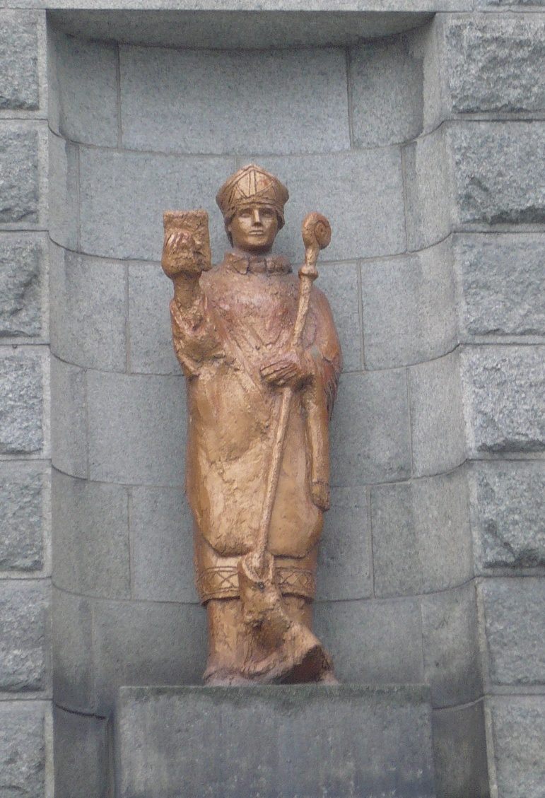 St Svithun (Swithun in english) på Frimurerlosjen på Løkkeveien i Stavanger